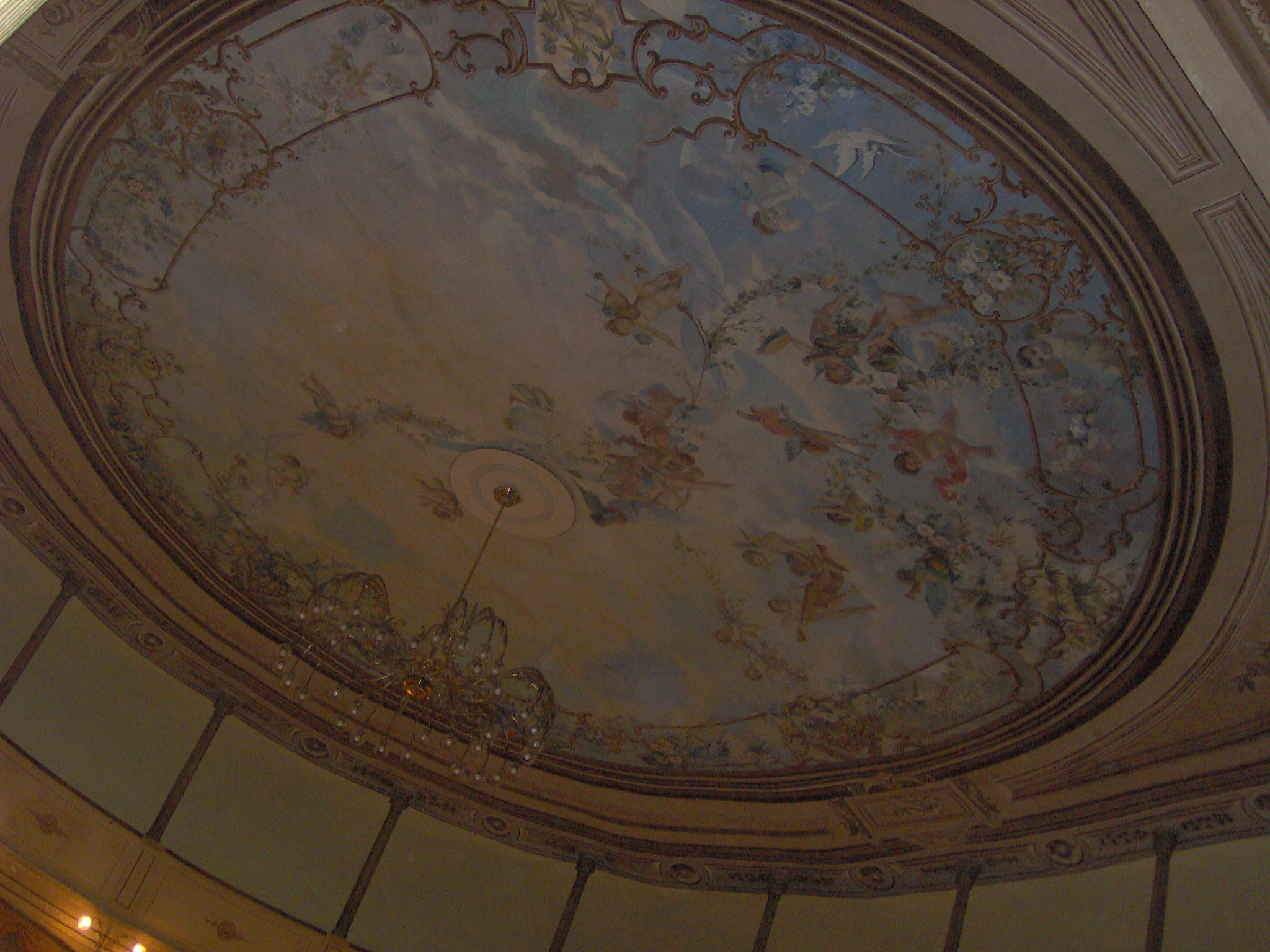 Soffitto del teatro Impavidi di Sarzana